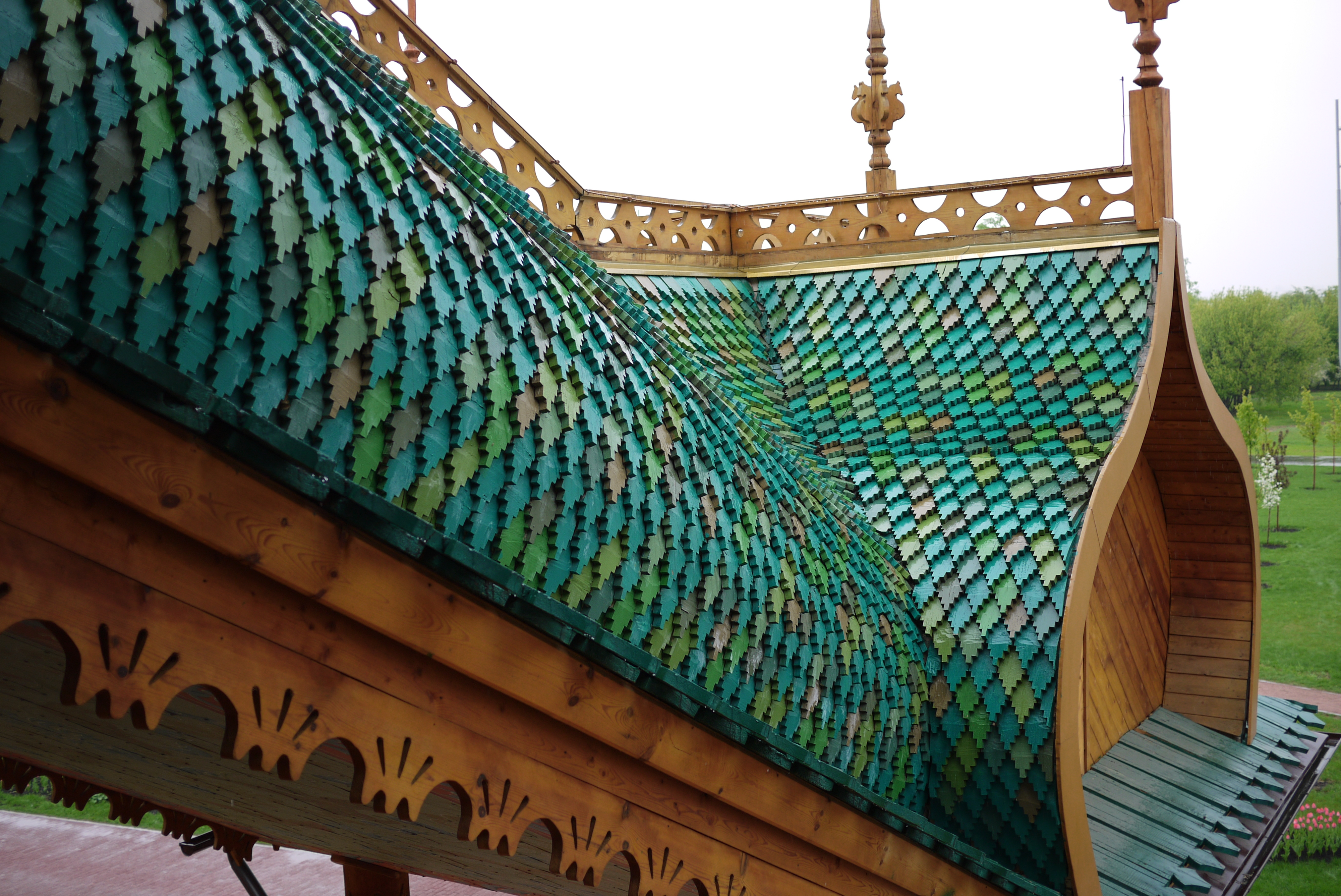 Деревянная крыша